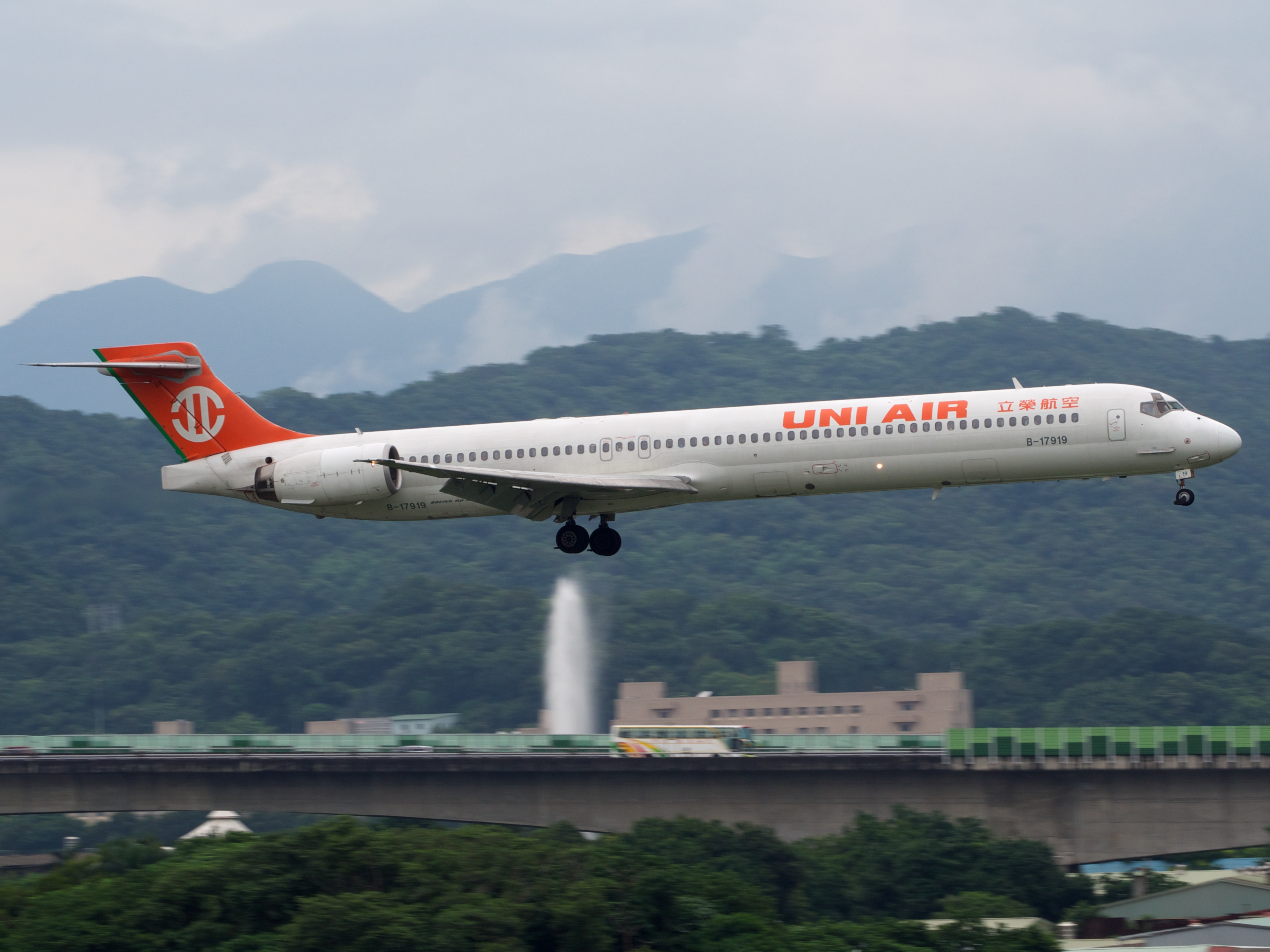 B-17919 | UNI AIR